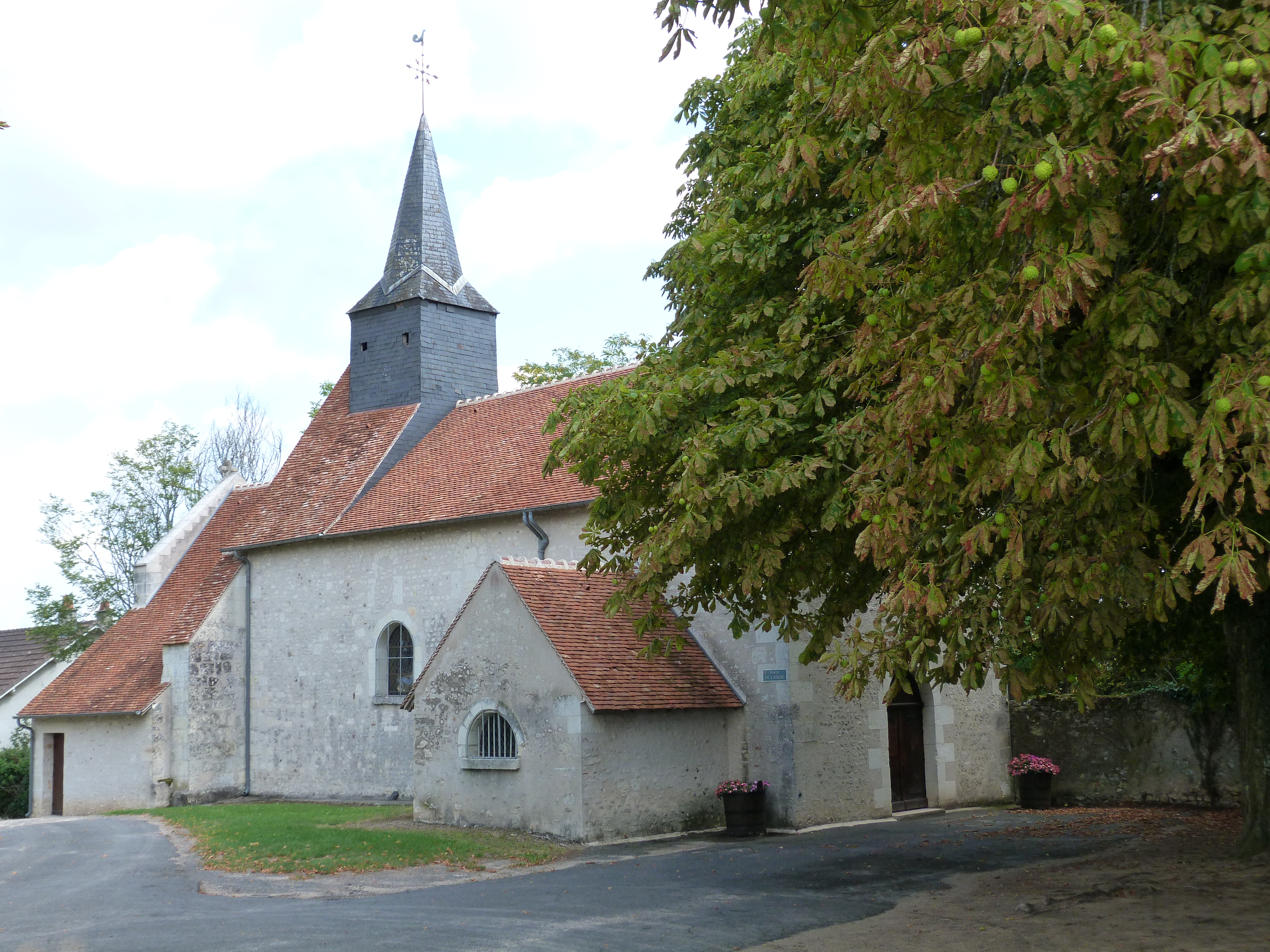 Eglise de Châtillon-sur-Cher